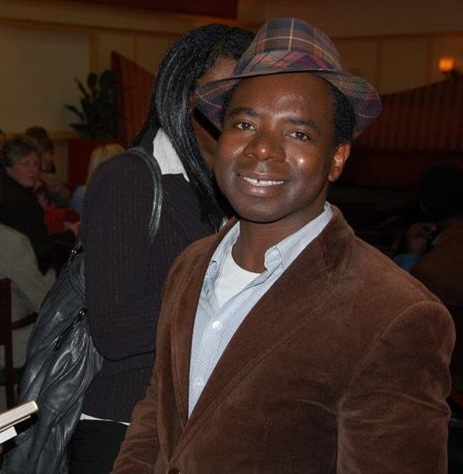 Schrijver Vamba Sherif tijdens een boekpresentatie. Foto: Marco in 't Veldt